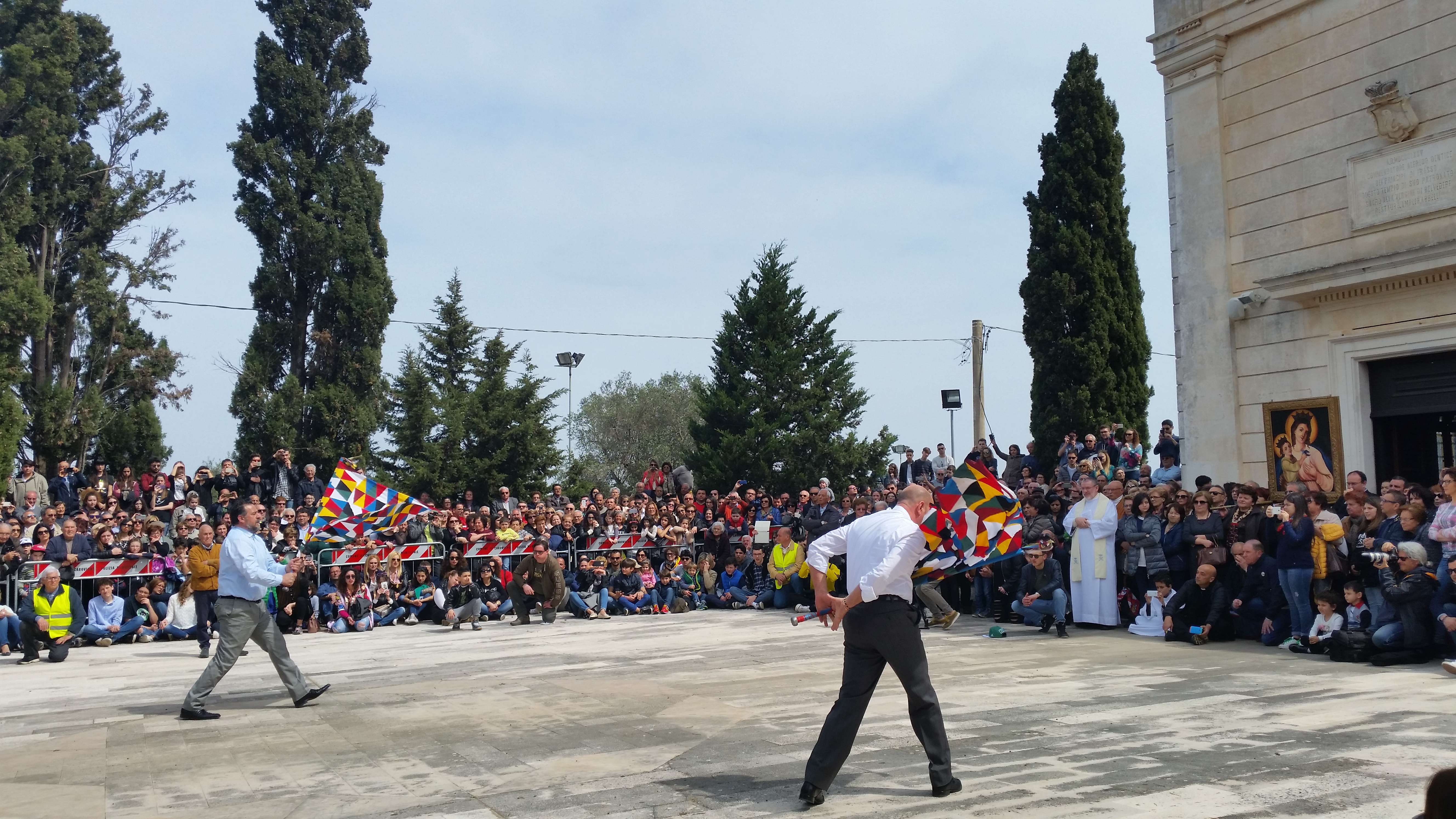 Battitura della 'Nzegna a Belvedere presso Carovigno(BR)